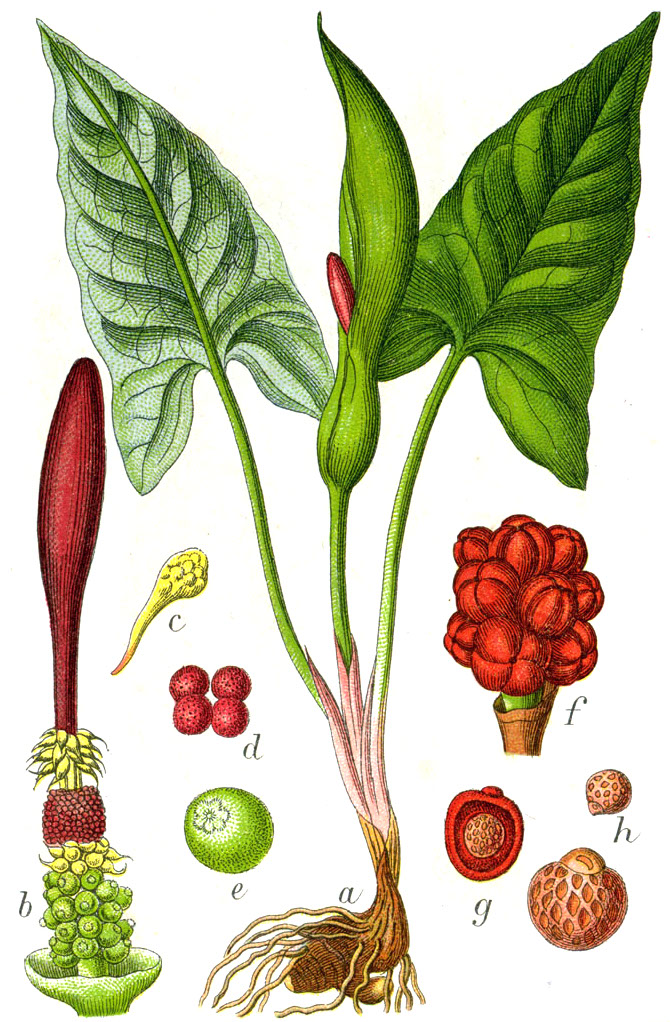 Arum maculatum L. s. str. Original Caption Gemeiner Aronsstab, Arum maculatum